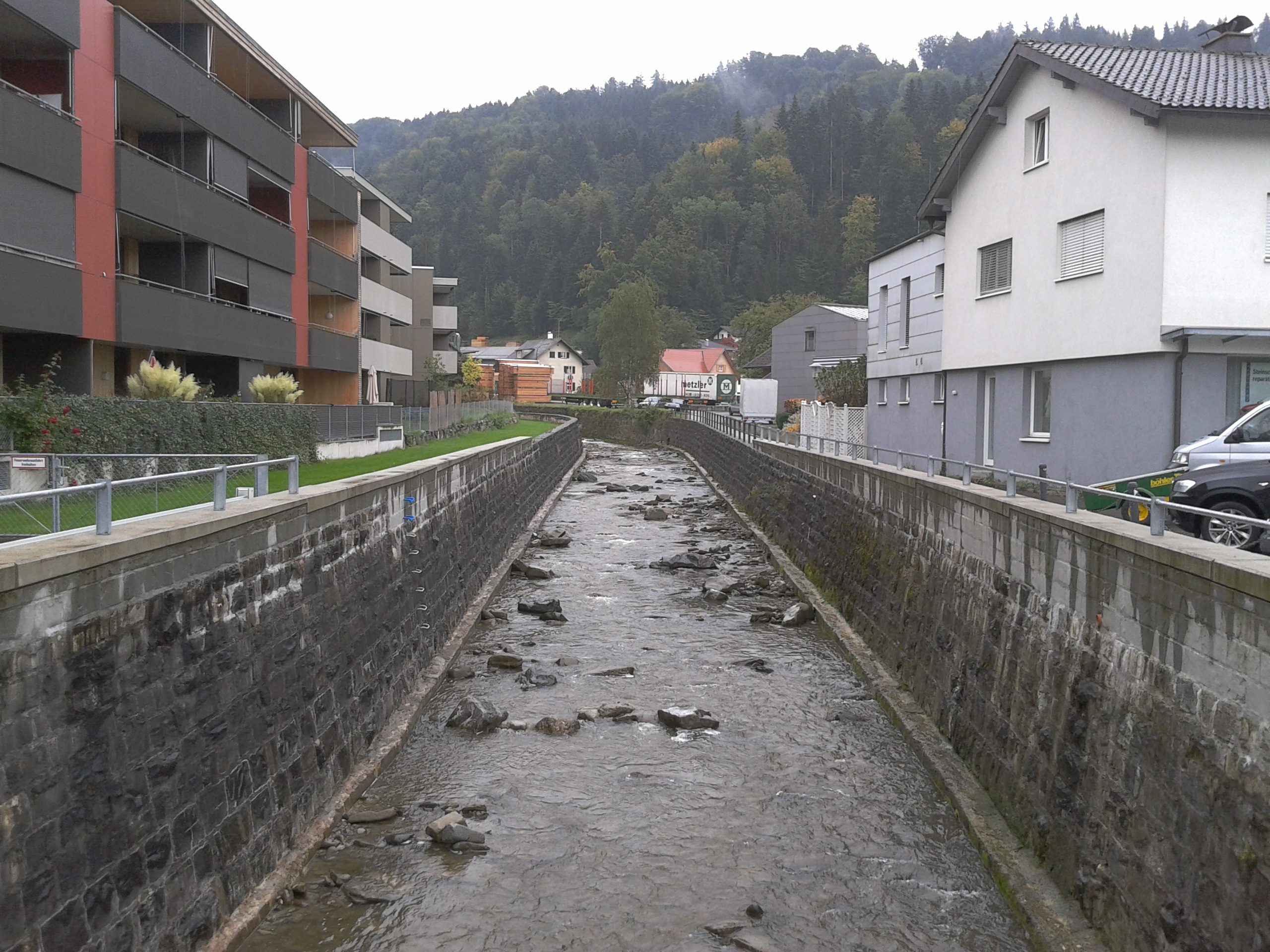 Schwarzach (Fluss) in der Gemeinde Schwarzach (Vorarlberg), Österreich. Blick flussaufwärts von der Hofsteigstrasse (L 3).